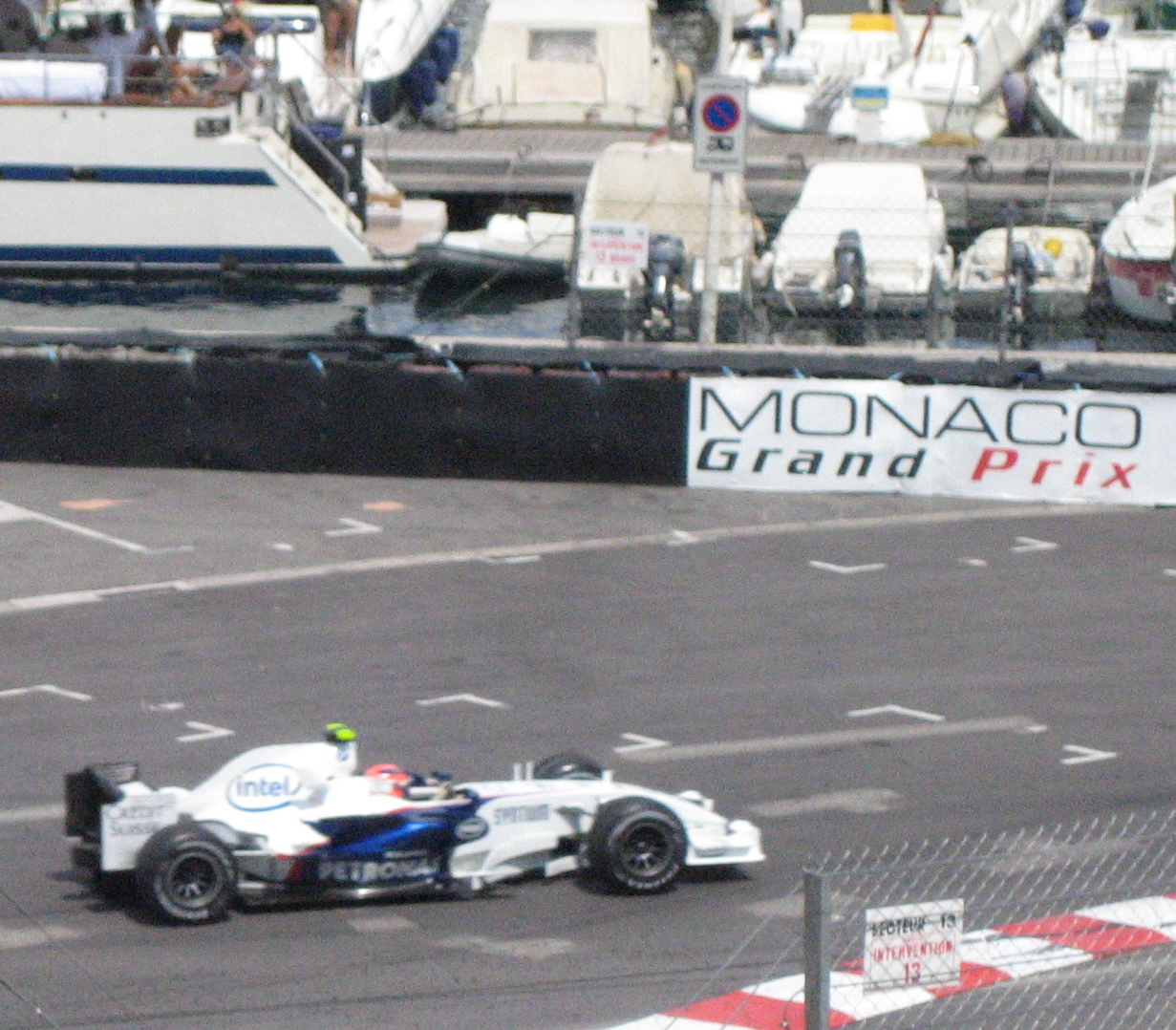 Kubica at 2007 Monaco Grand Prix